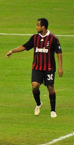 Amantino Mancini con la maglia del Milan